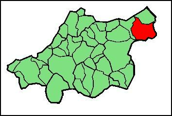 izendaturiko udalerriaren kokapena Lapurdin